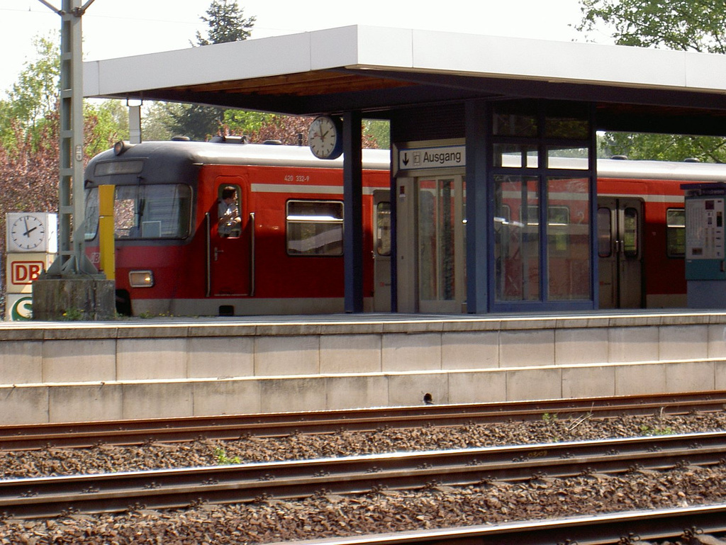 Frankfurt Louisa April 2009